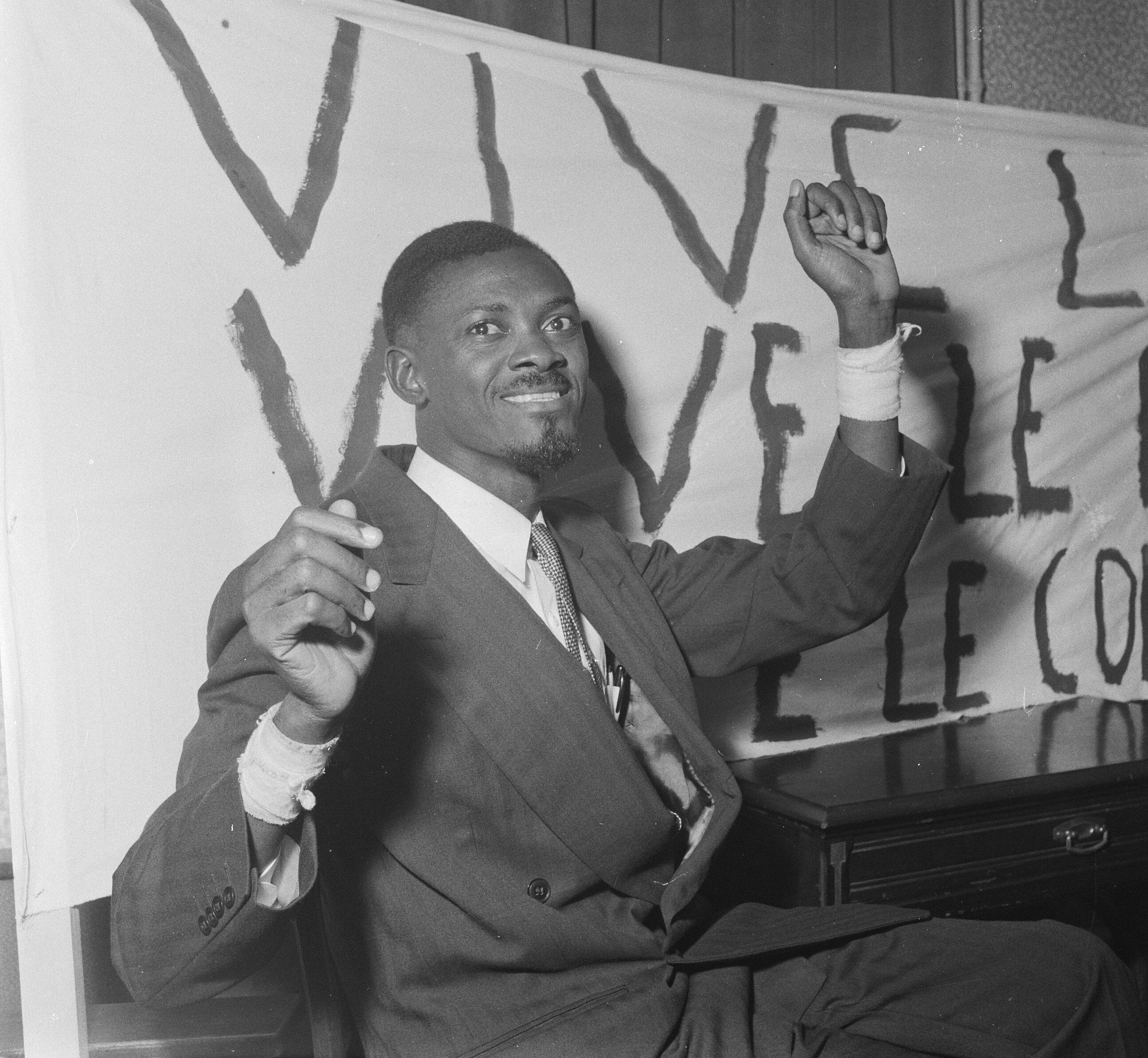 Collectie / Archief : Fotocollectie Anefo Reportage / Serie : [ onbekend ] Beschrijving : De Congolese leider Patrice Loemoemba in Brussel Datum : 26 januari 1960 Locatie : Brussel Trefwoorden : leiders Persoonsnaam : Lumumba, Patrice Fotograaf : Pot, Harry / Anefo Auteursrechthebbende : Nationaal Archief Materiaalsoort : Negatief (zwart/wit) Nummer archiefinventaris : bekijk toegang 2.24.01.03 Bestanddeelnummer : 910-9733